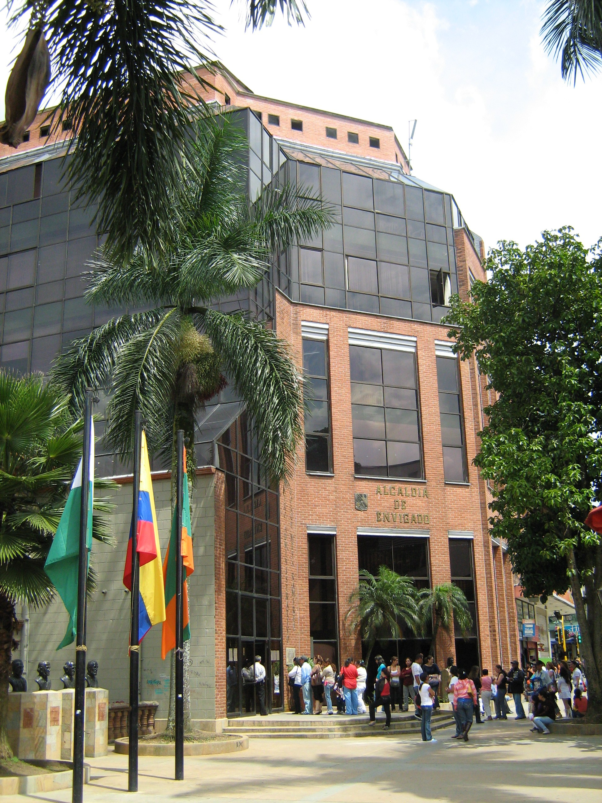 Alcaldia de Envigado. Colombia